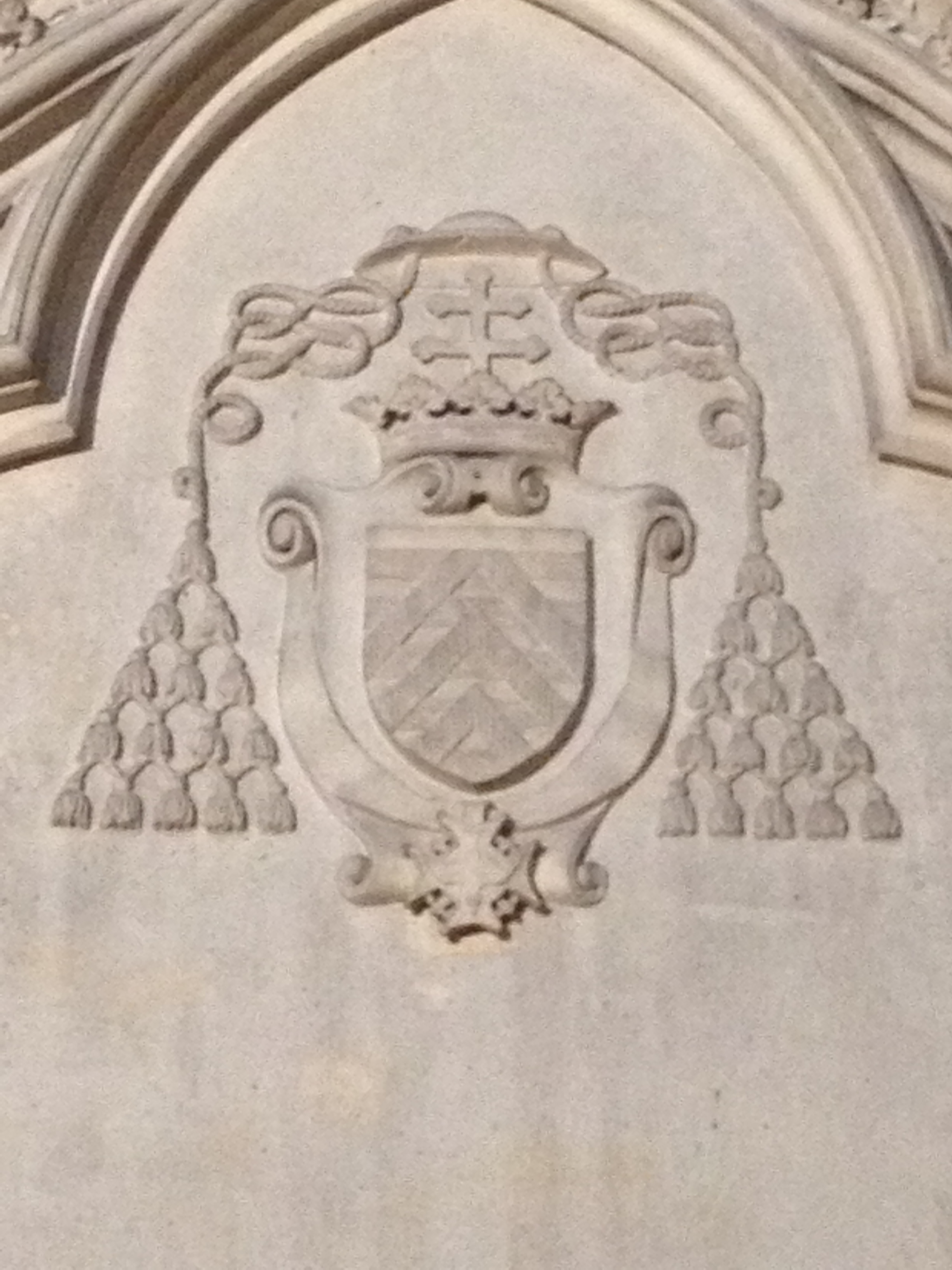 Armoiries de Dominique de La Rochefoucauld.